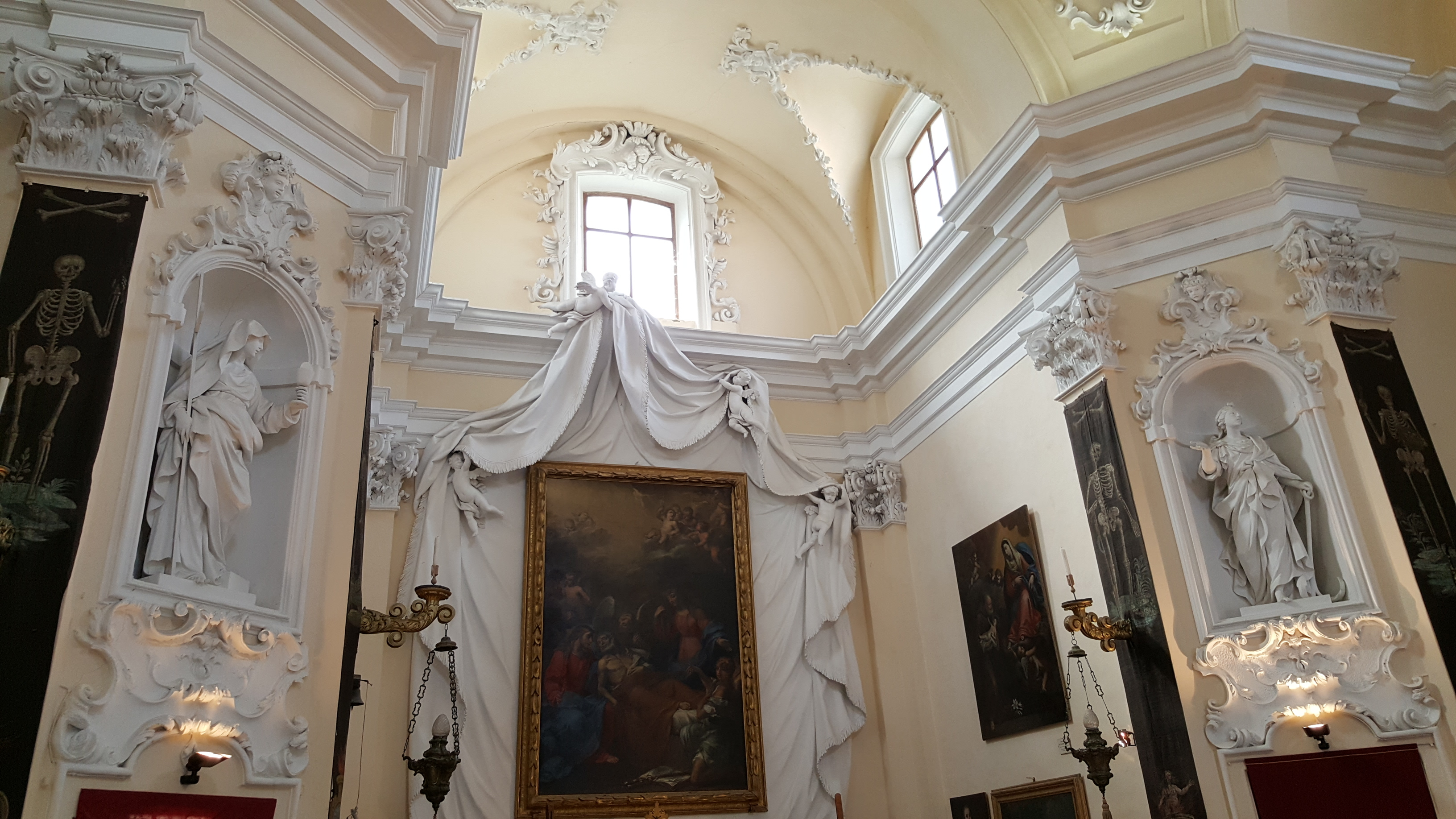 Museo d'Arte Sacra This is a photo of a monument which is part of cultural heritage of Italy.